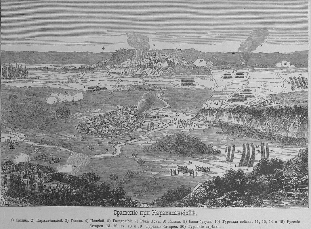 Сражение при Карахасанкиое. 1) Садипа; 2) Карахасанскиой; 3) Гагово, разрушенное бомбардтрованием; 4) Попкиой; 5) Гайдар-Киой; 7) река Лом; 8) казаки; 9) баши-базуки; 10) турецкая армия, наступающая от Разгради; 11, 12, 14, 15) русские батареи; 13) турецкая батарея стрелявшая по русским батареям 11 и 12; 16, 17, 18, 19) турецкие батареи; 20) турецкие стрелки, переправляющиеся через Лом. Это изображение было использовано для иллюстрирования статьи «Карахасан-Киой» (ныне Зараево) опубликованной в двенадцатом томе «Военной энциклопедии», который был издан книгоиздательским товариществом И. Д. Сытина в 1913 году в столице Российской империи городе Санкт-Петербурге. Подробное описание к этой картинке можно прочесть в указанной статье.